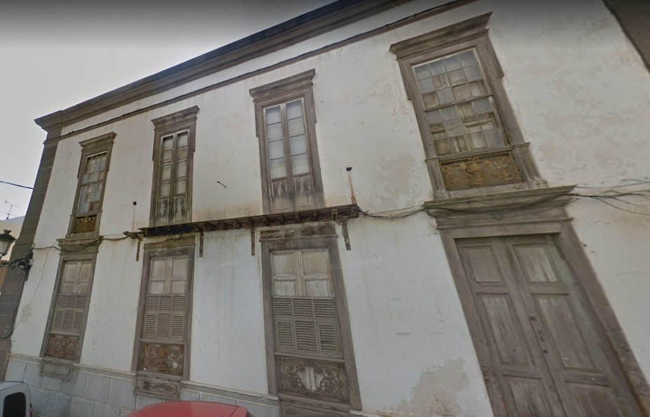 Frontis de la Casa del Conde